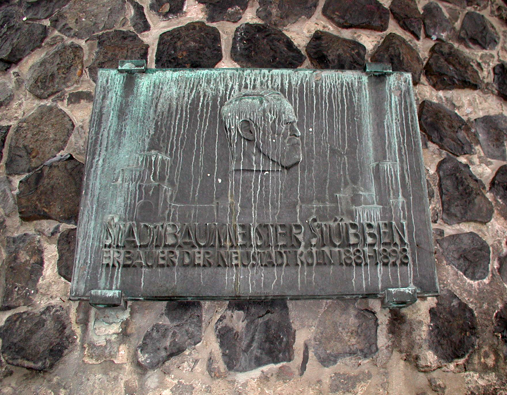 Köln Innenstadt-Süd